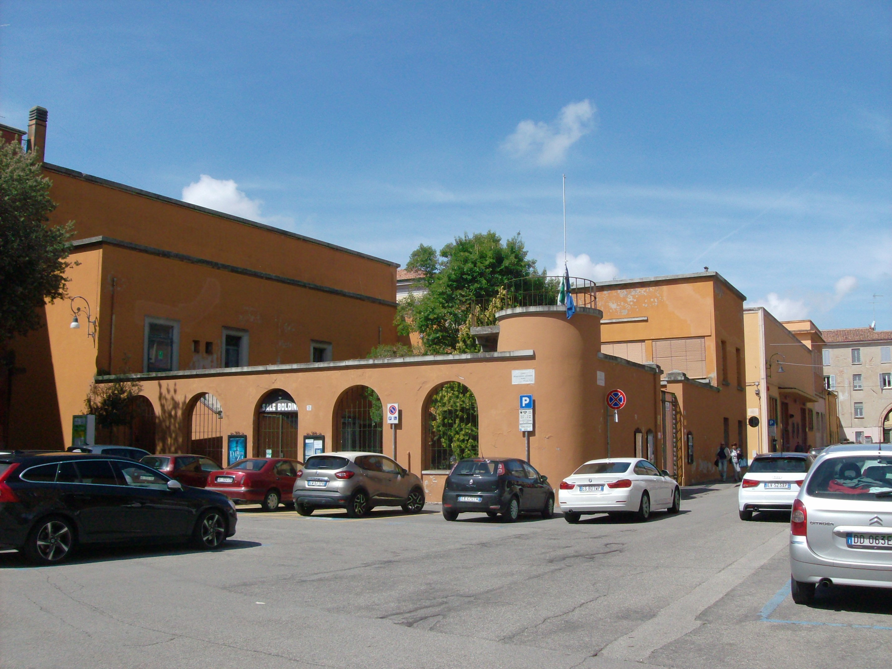 Sala Boldini di Ferrara